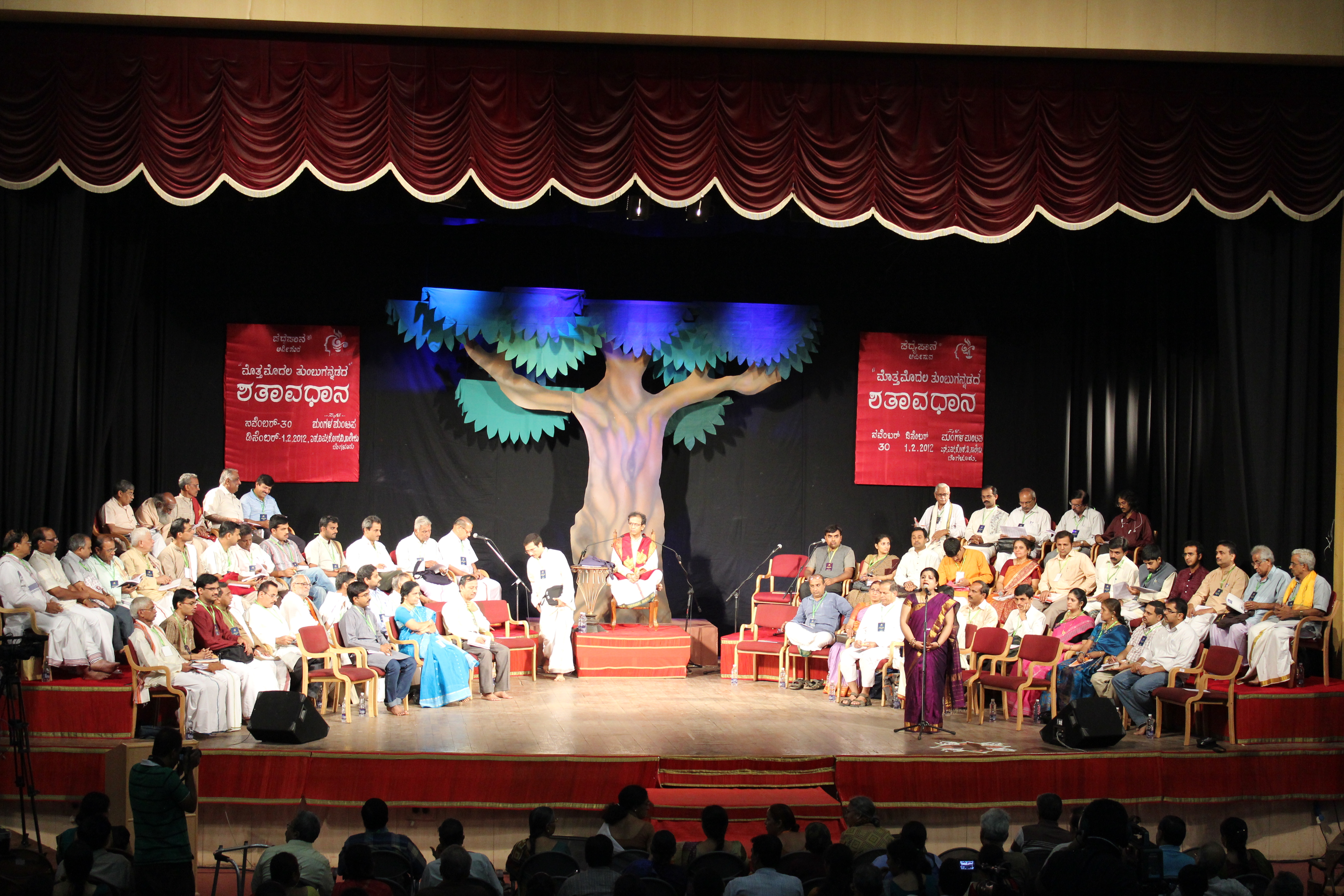 ಕನ್ನಡ: 1=2012ರಲ್ಲಿ ನಡೆದ ಶತಾವಧಾನಿ ಡಾ ಆರ್ ಗಣೇಶ್ ಅವರ ಮೊತ್ತಮೊದಲ ತುಂಬುಗನ್ನಡದ ಶತಾವಧಾನದ ಛಾಯಾಚಿತ್ರ.